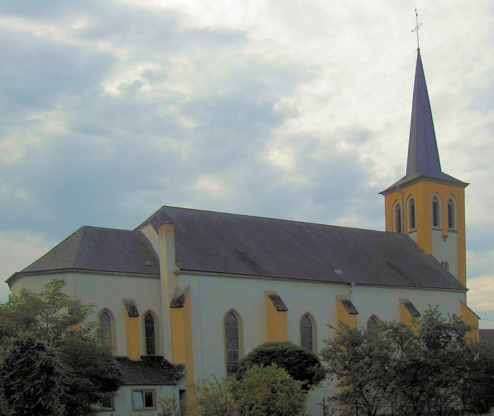 katholische Pfarrkirche St. Peter in Temmels, Landkreis Trier-Saarburg